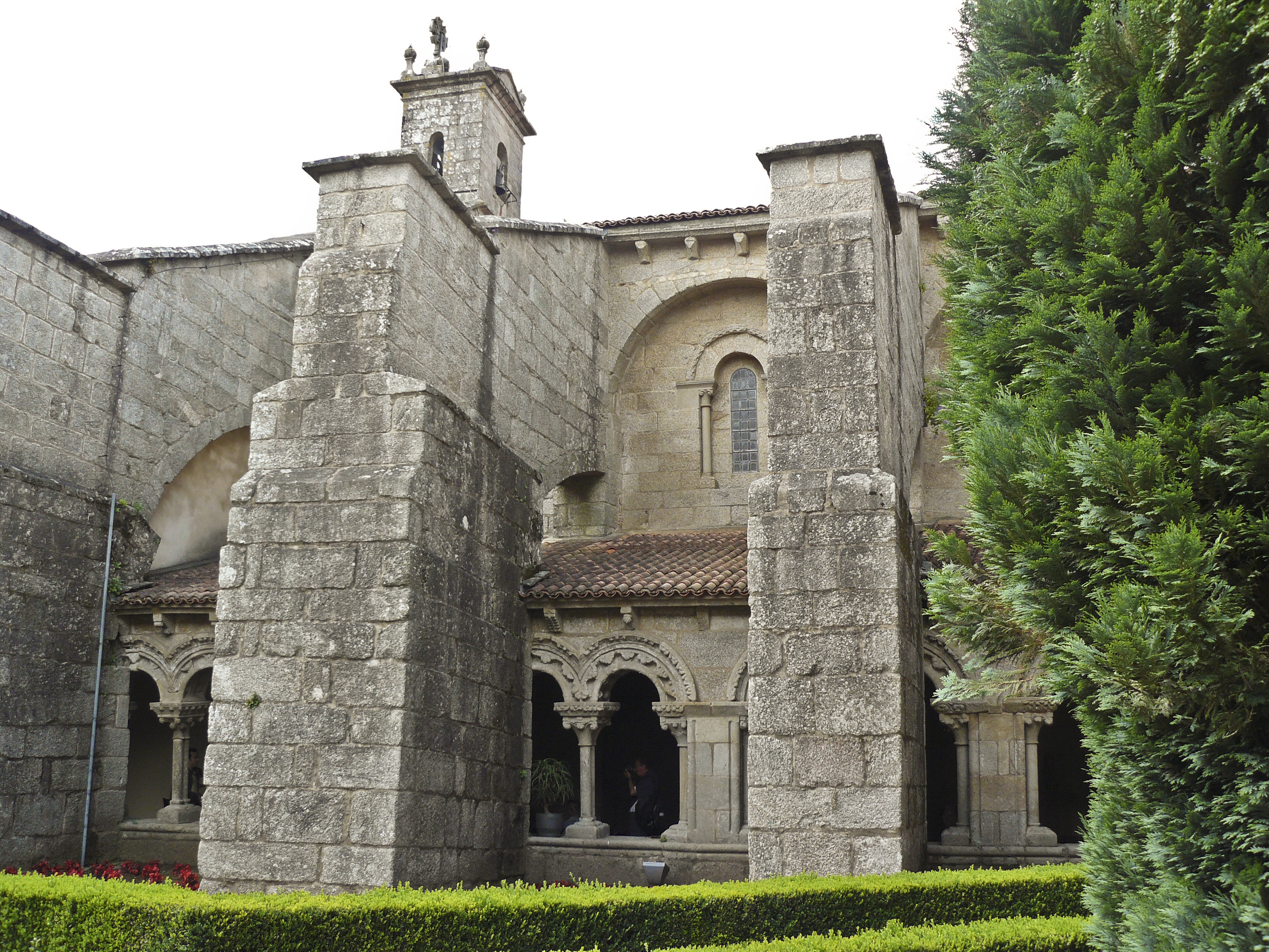 Resto do claustro románico da Colexiata de Sar